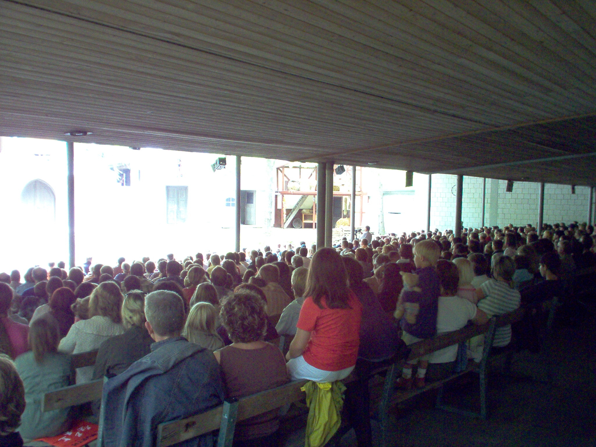 Voll besetzter Zuschauerraum der Waldbühne Sdf